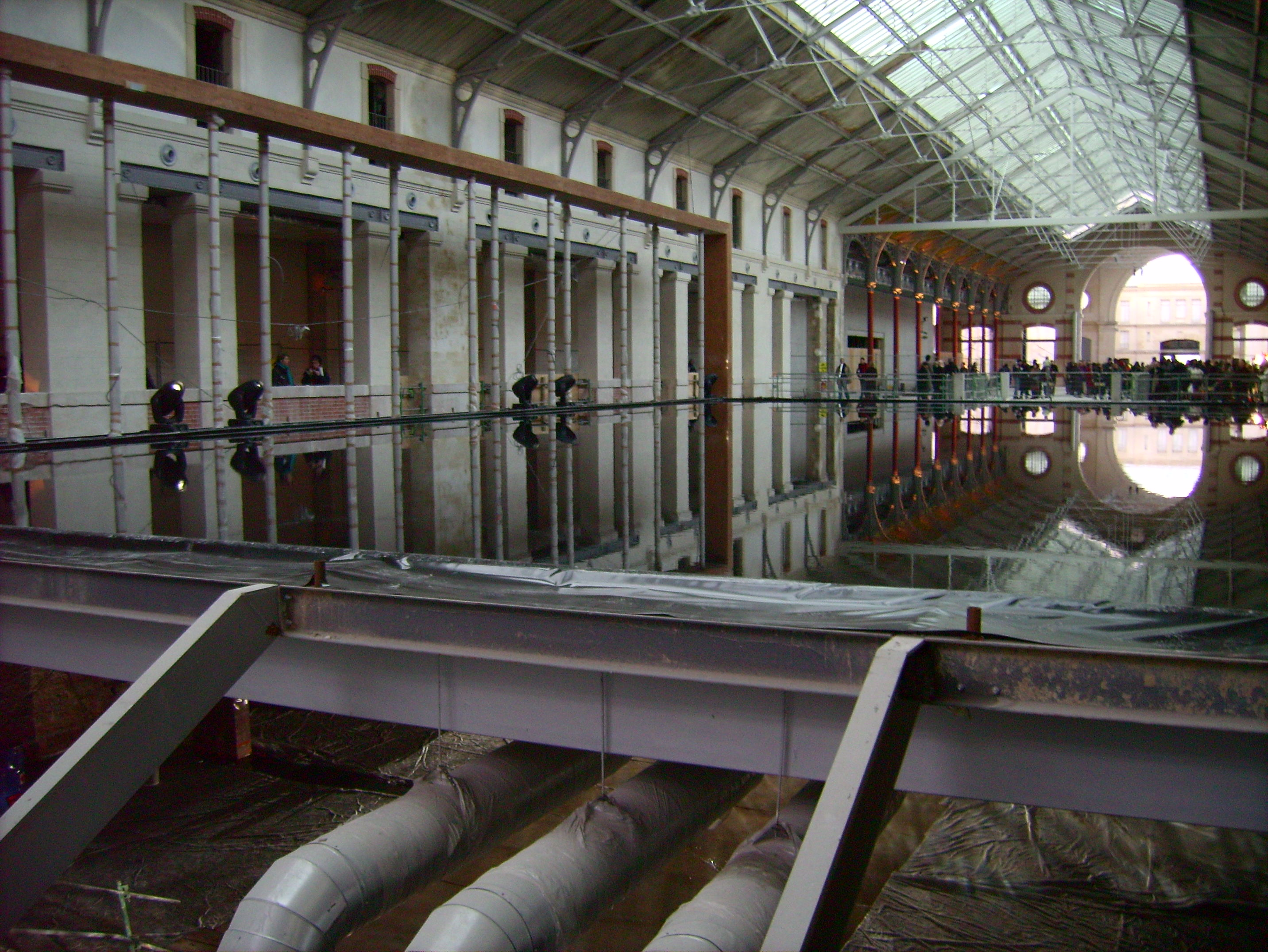 Le centre culturel du 104 (Paris) lors des journées portes ouvertes du chantier, le 29/12/2007.